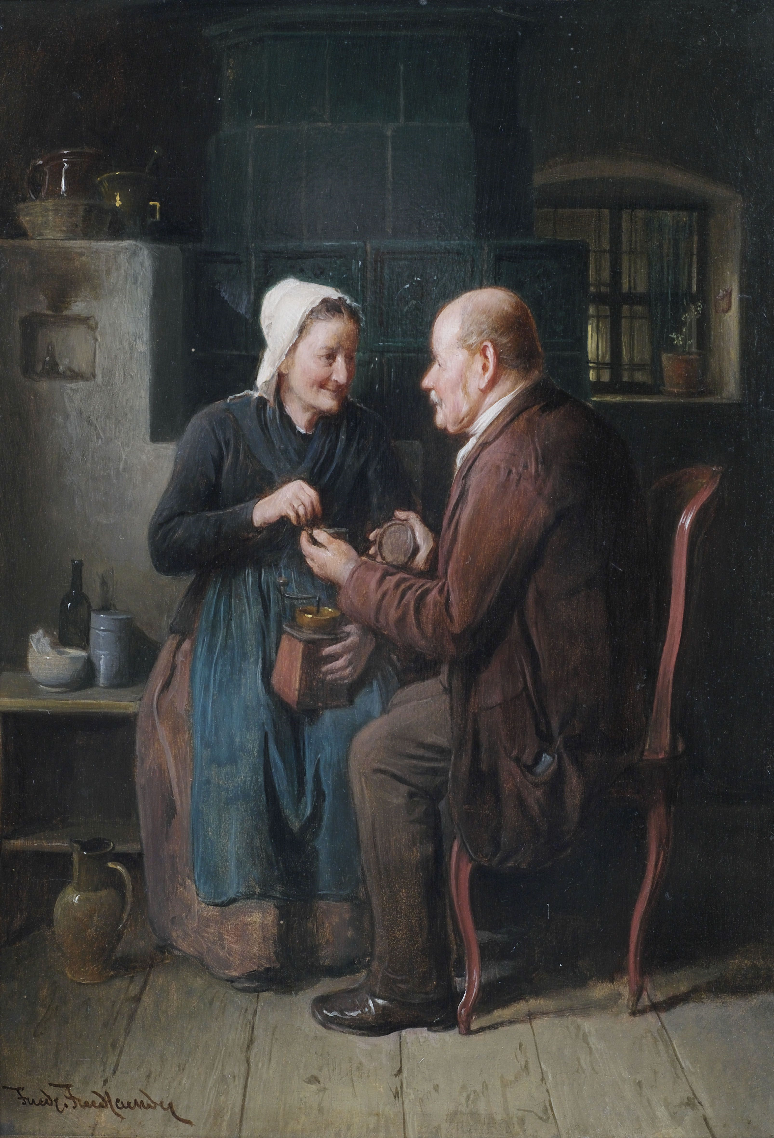 Älteres Paar im Kücheninterieur. Öl auf Holz, unten links signiert. 31 x 22 cm.